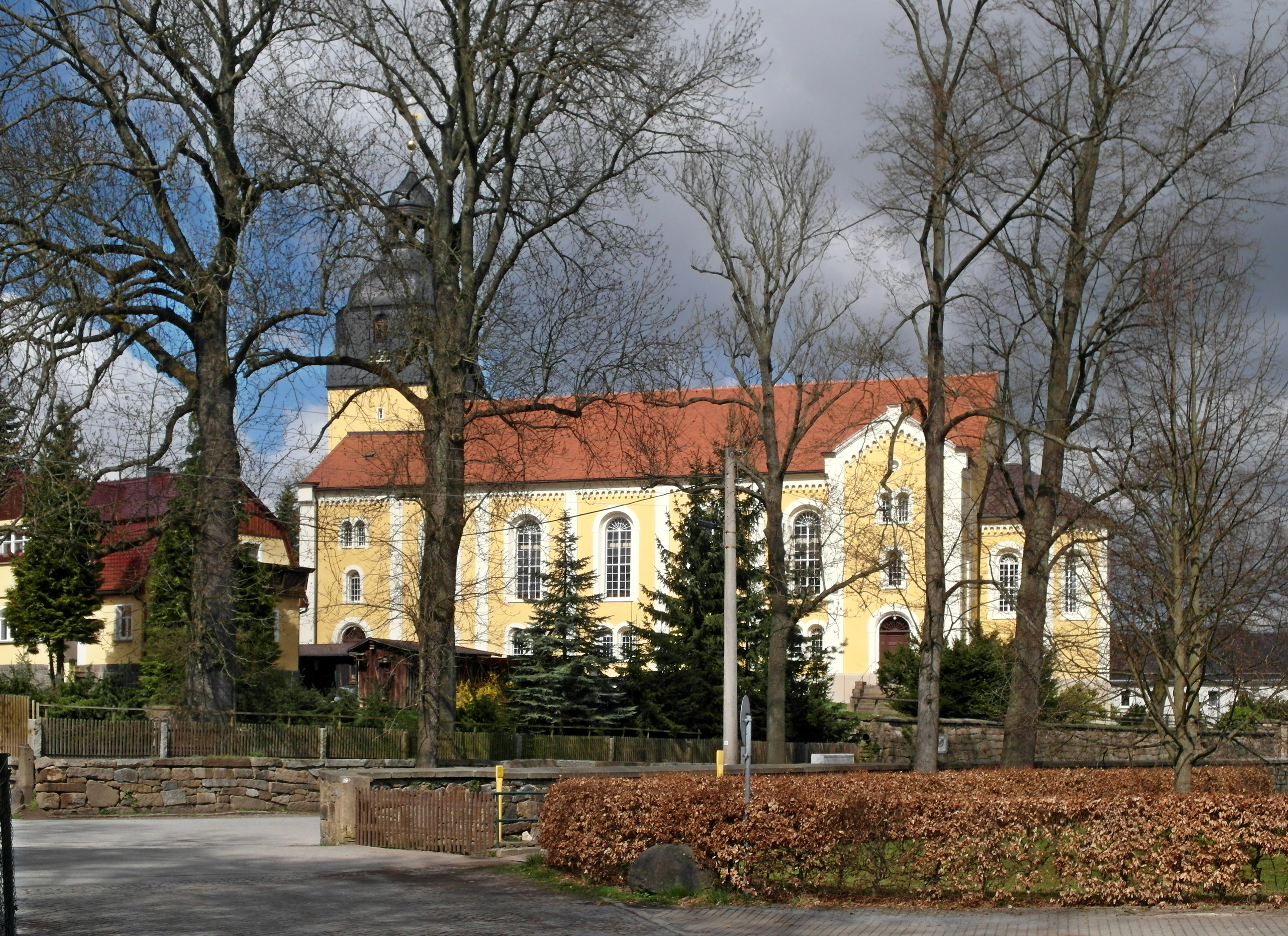 06.04.2017 01904 Steinigtwolmsdorf: Evangelische Kirche (GMP: 51.063031,14.346140). Heutiger Bau von 1860-1861. Sicht von Süden. [SAM9252.JPG]20170406310DR.JPG(c)Blobelt